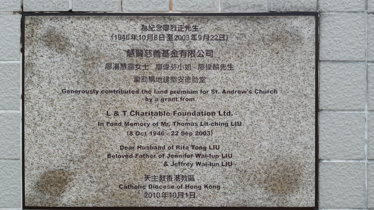 香港將軍澳聖安德勒堂懷念廖烈正的碑銘